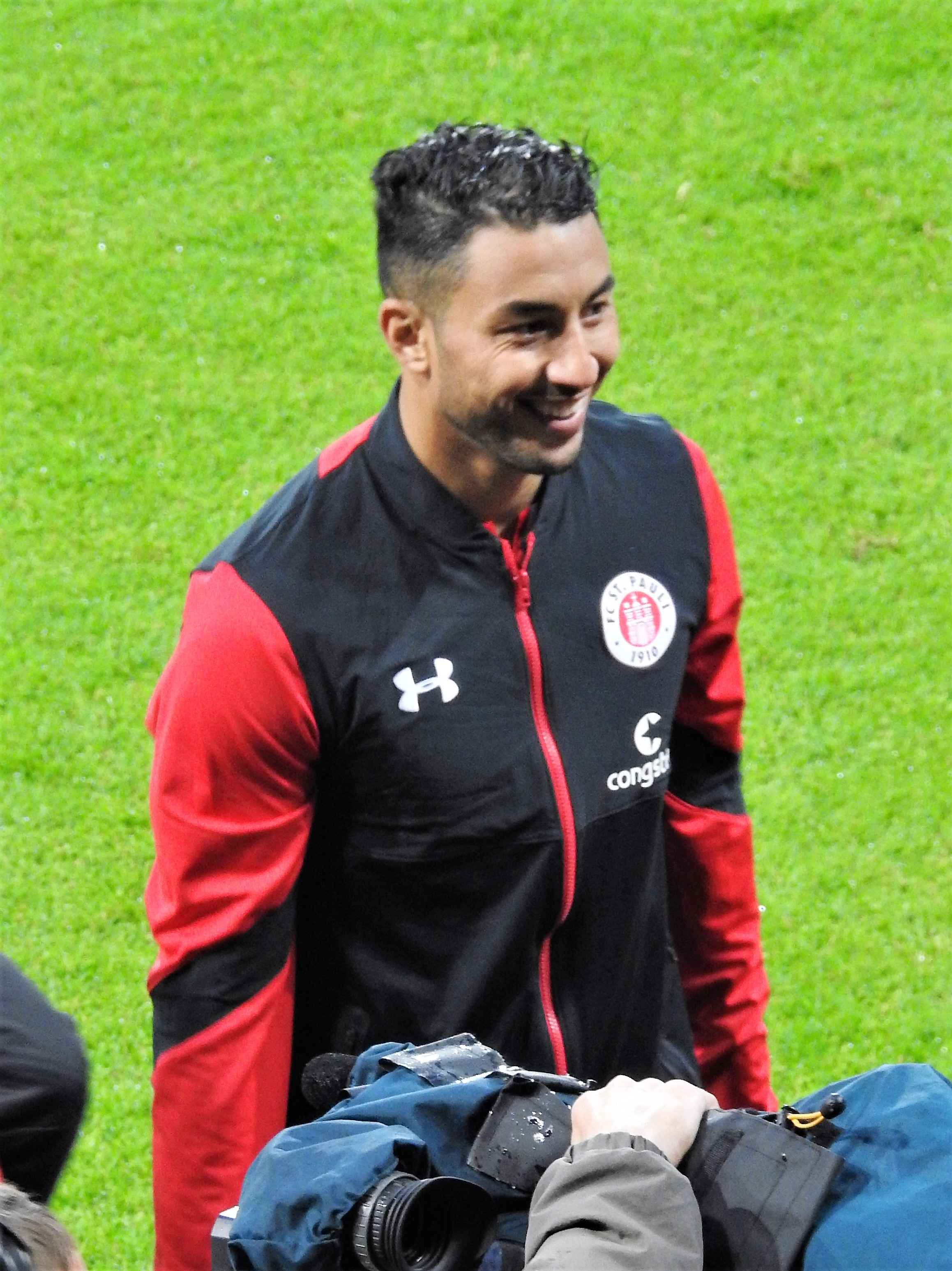 Aziz Bouhaddouz als Spieler vom FC St.Pauli